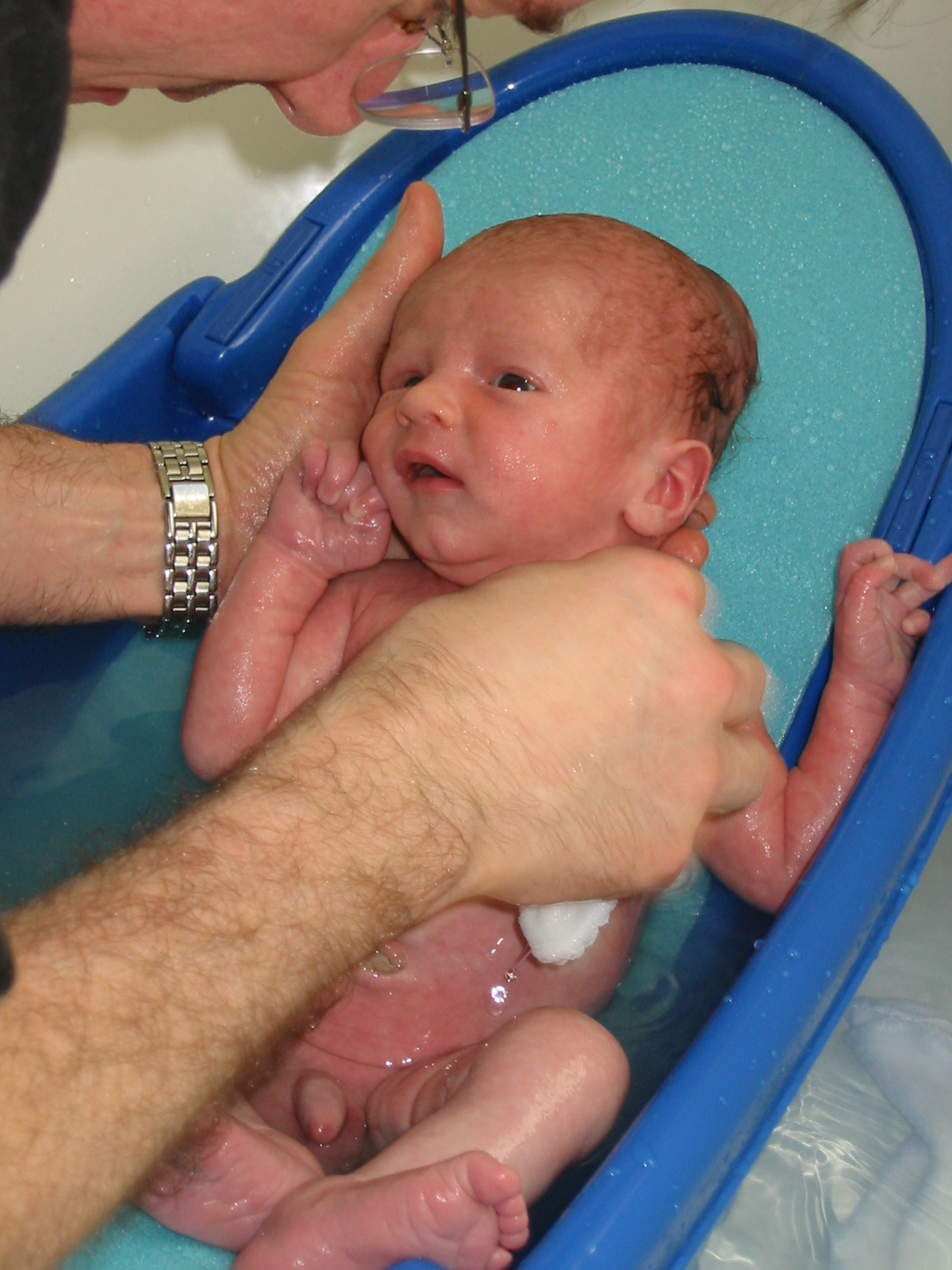 Nyfødt guttebaby bades.